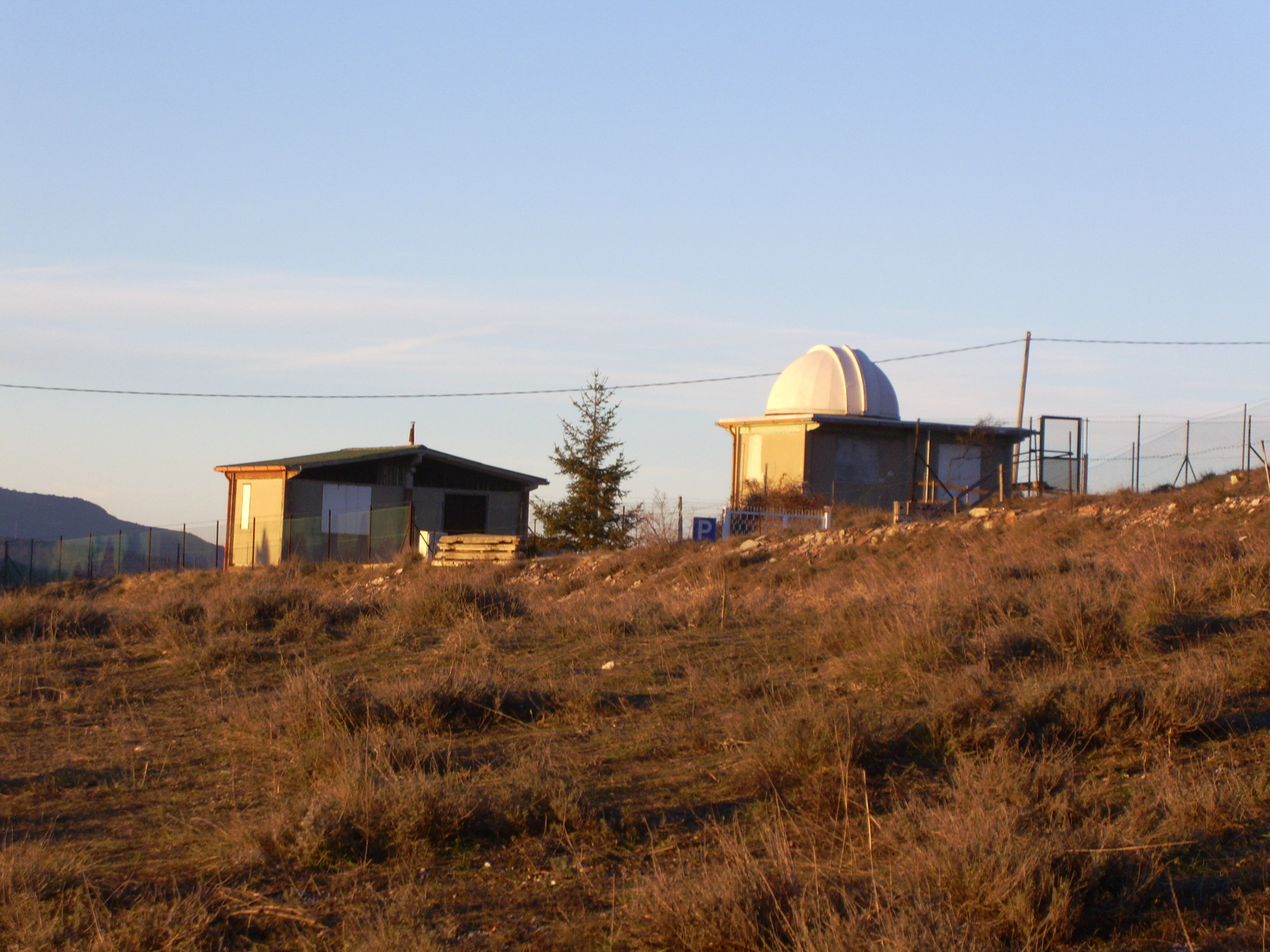 L'osservatorio astronomico Nebula, nei pressi di Torre Beregna.